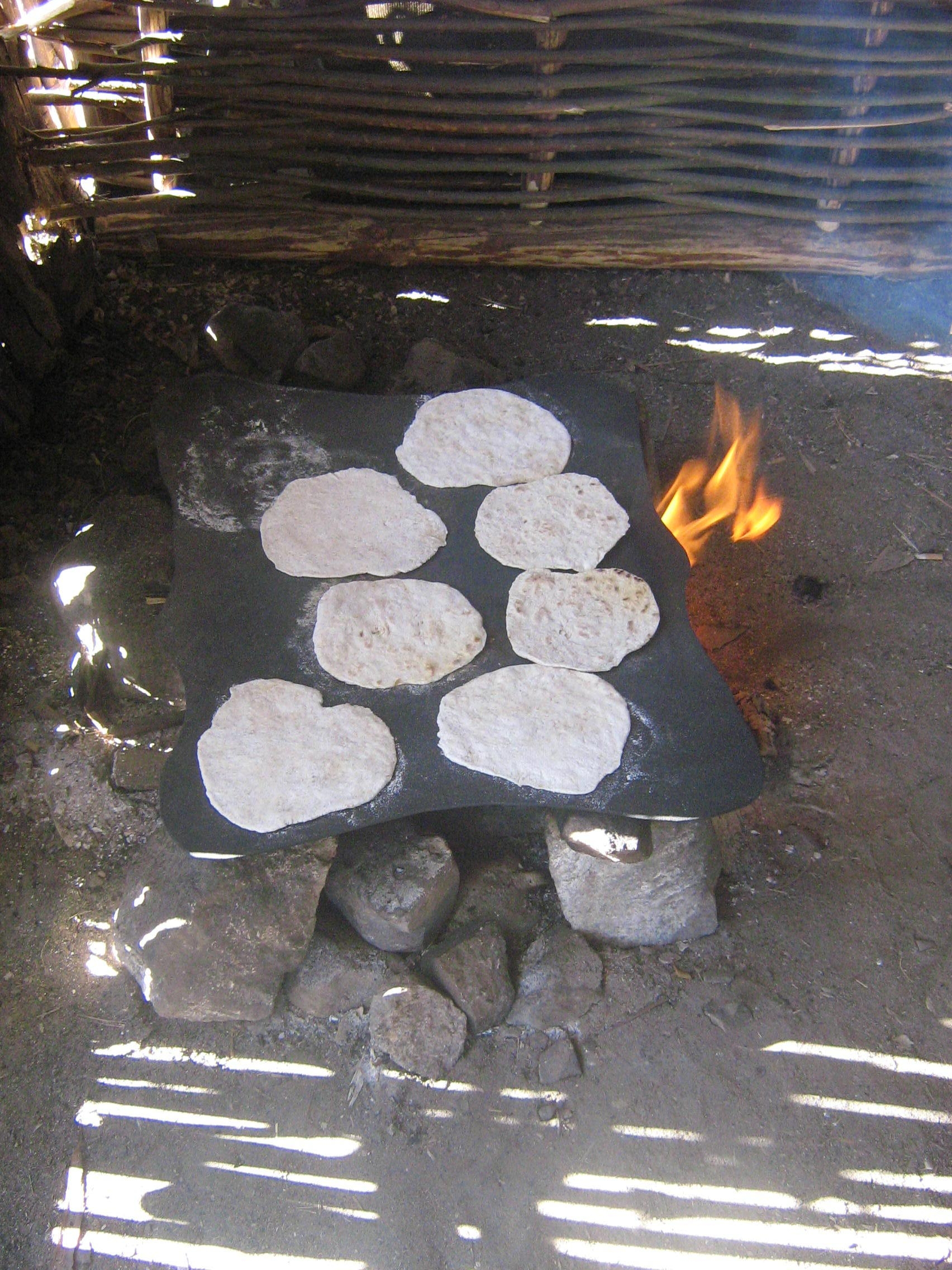 Pieczenie podpłomyków